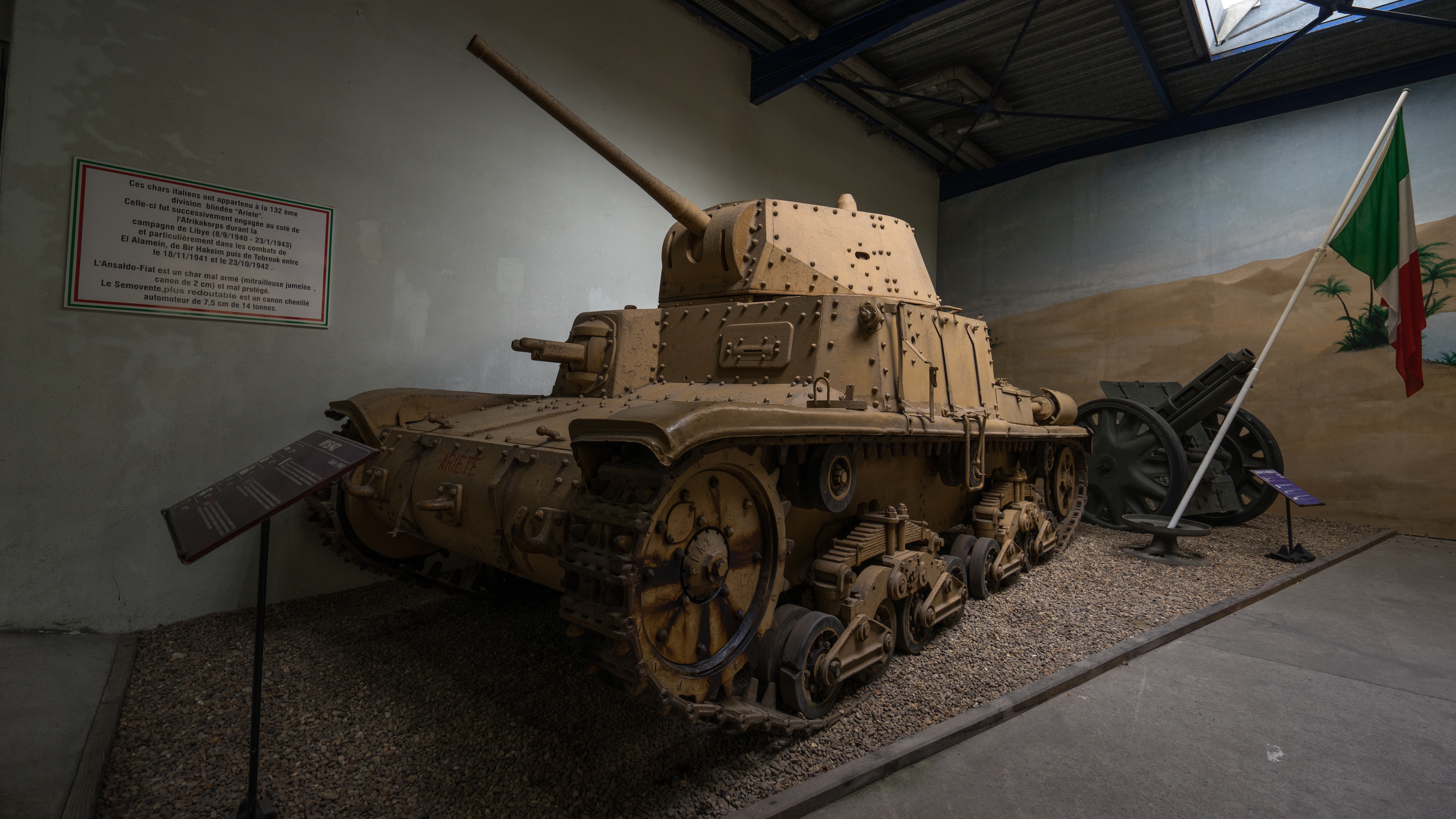 Ce char a appartenu à la 132ème Division Blindée italienne “Ariete”